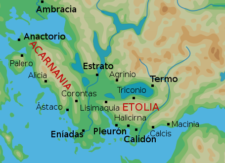 Mapa de algunas de las ciudades griegas de las regiones de Etolia y Acarnania en la Antigüedad.